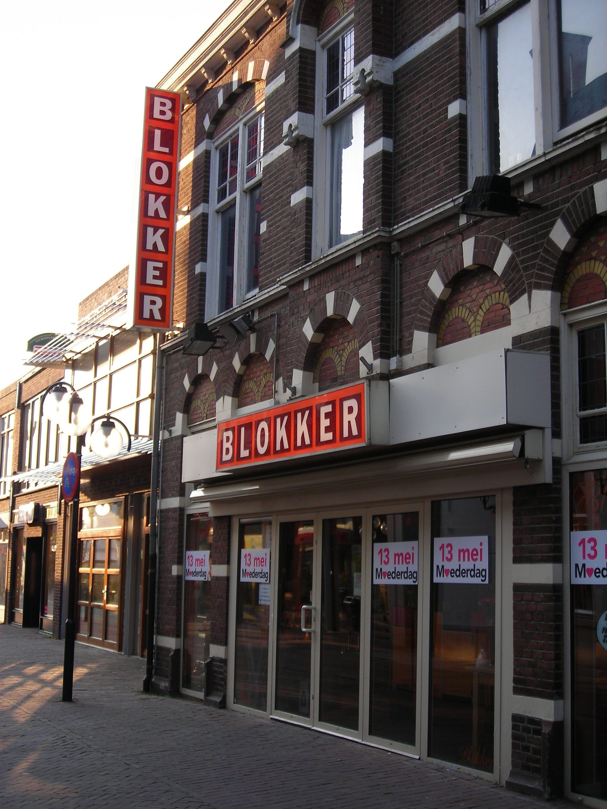 A Blokker store in Boxmeer